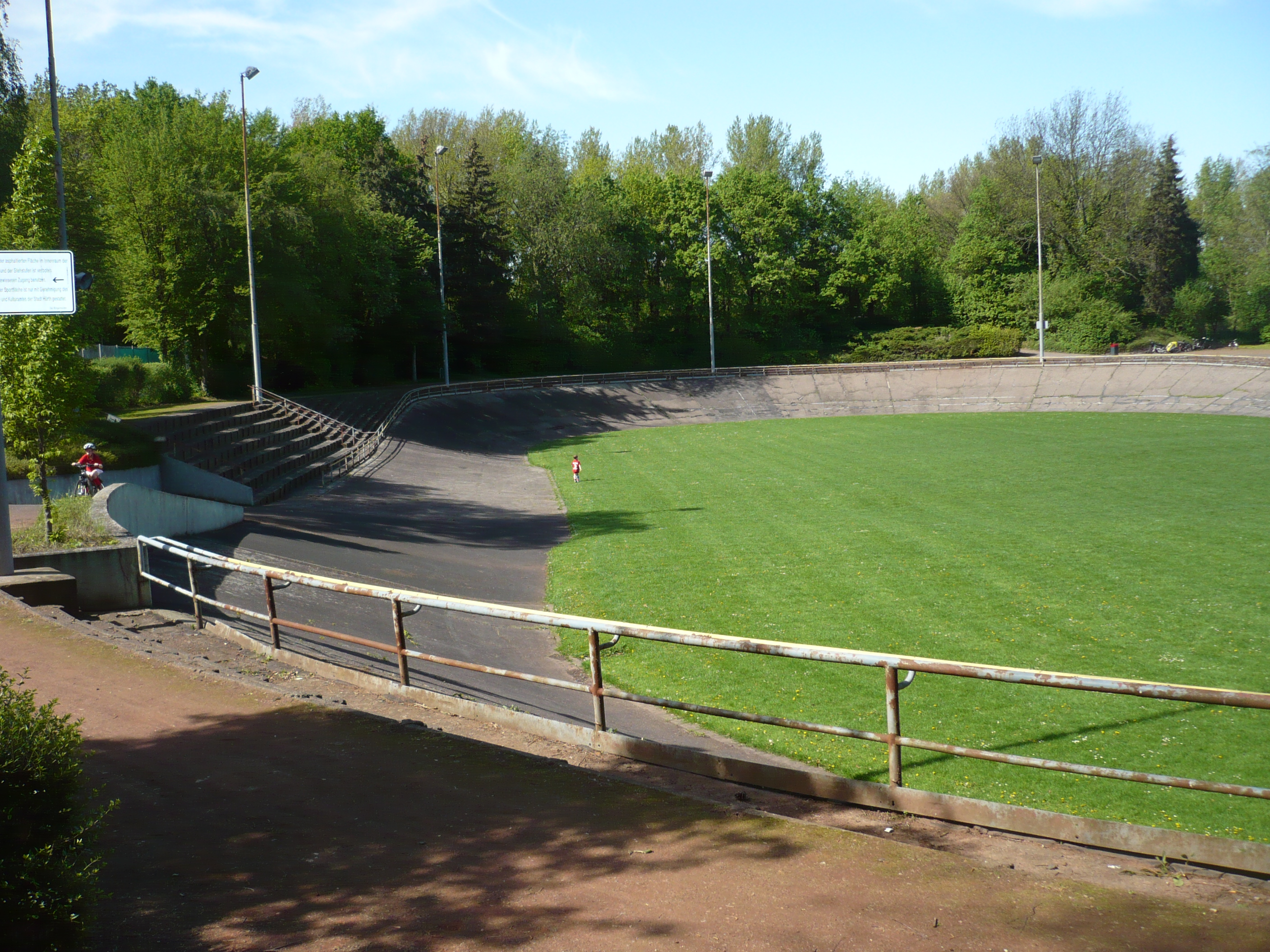 ehemaliges Radstadion Hürth